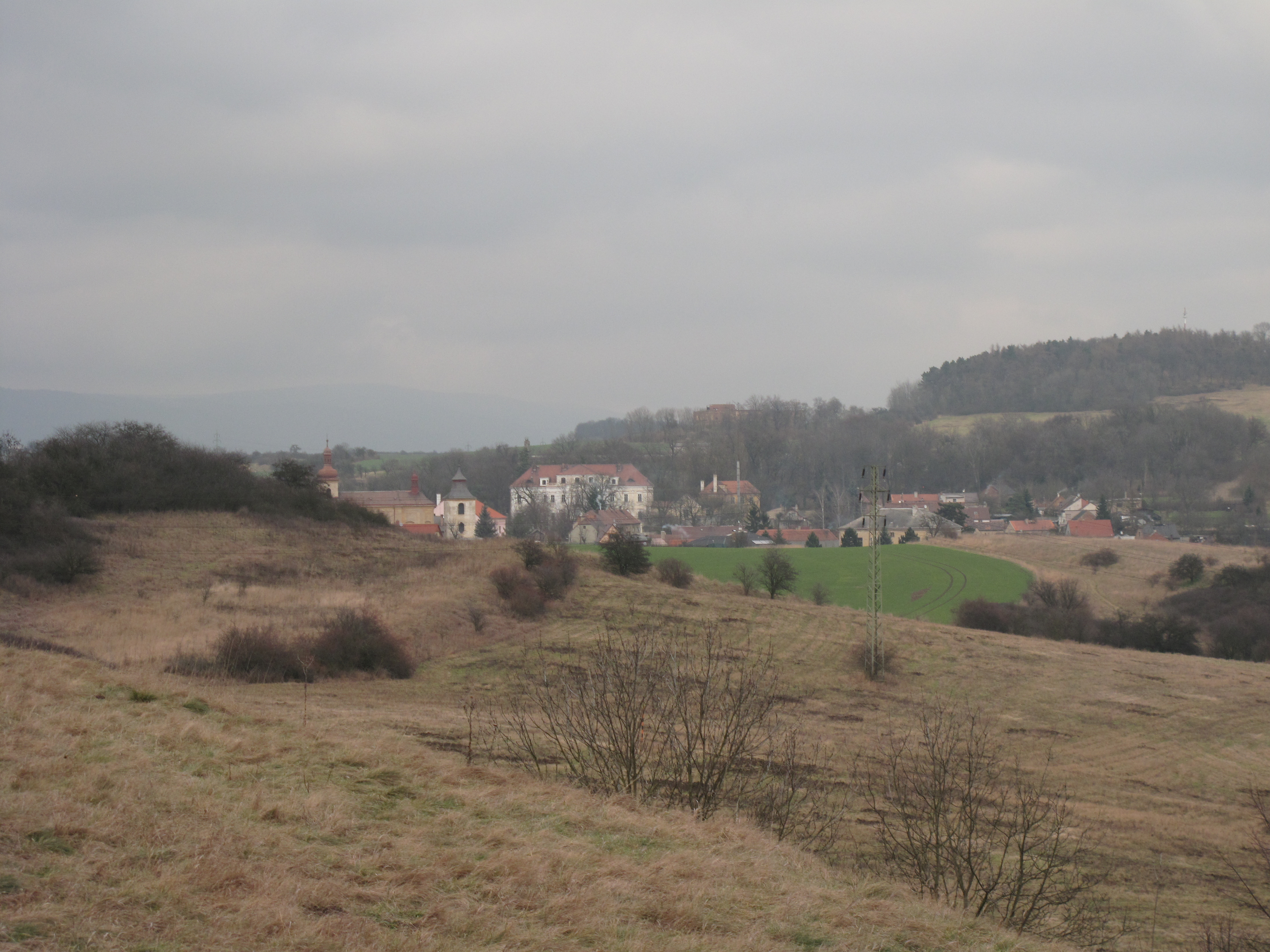 Křemýž v pohledu z Husova vrchu. Okres Teplice, Česká republika.